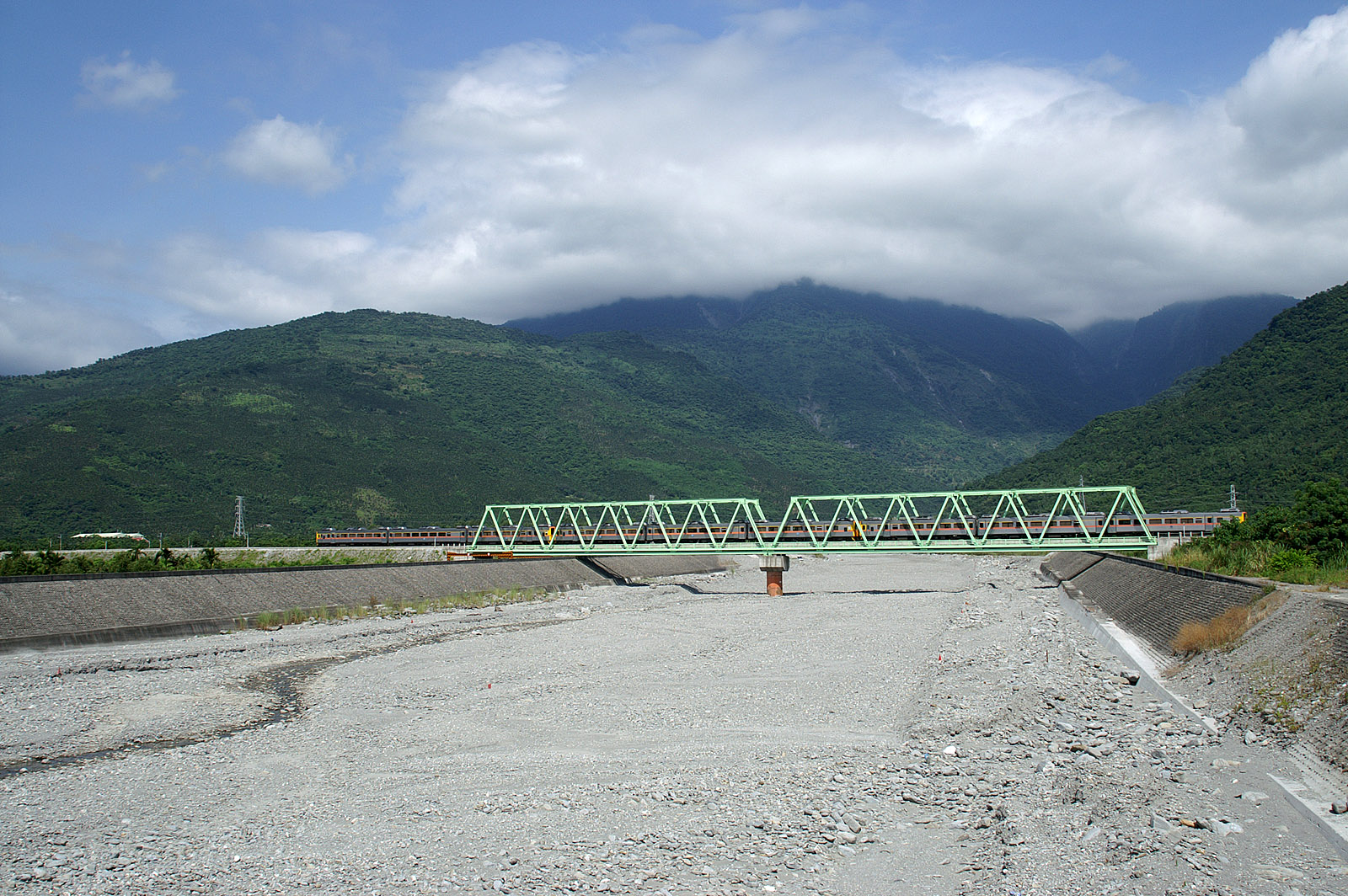 臺東線新加濃濃溪橋。